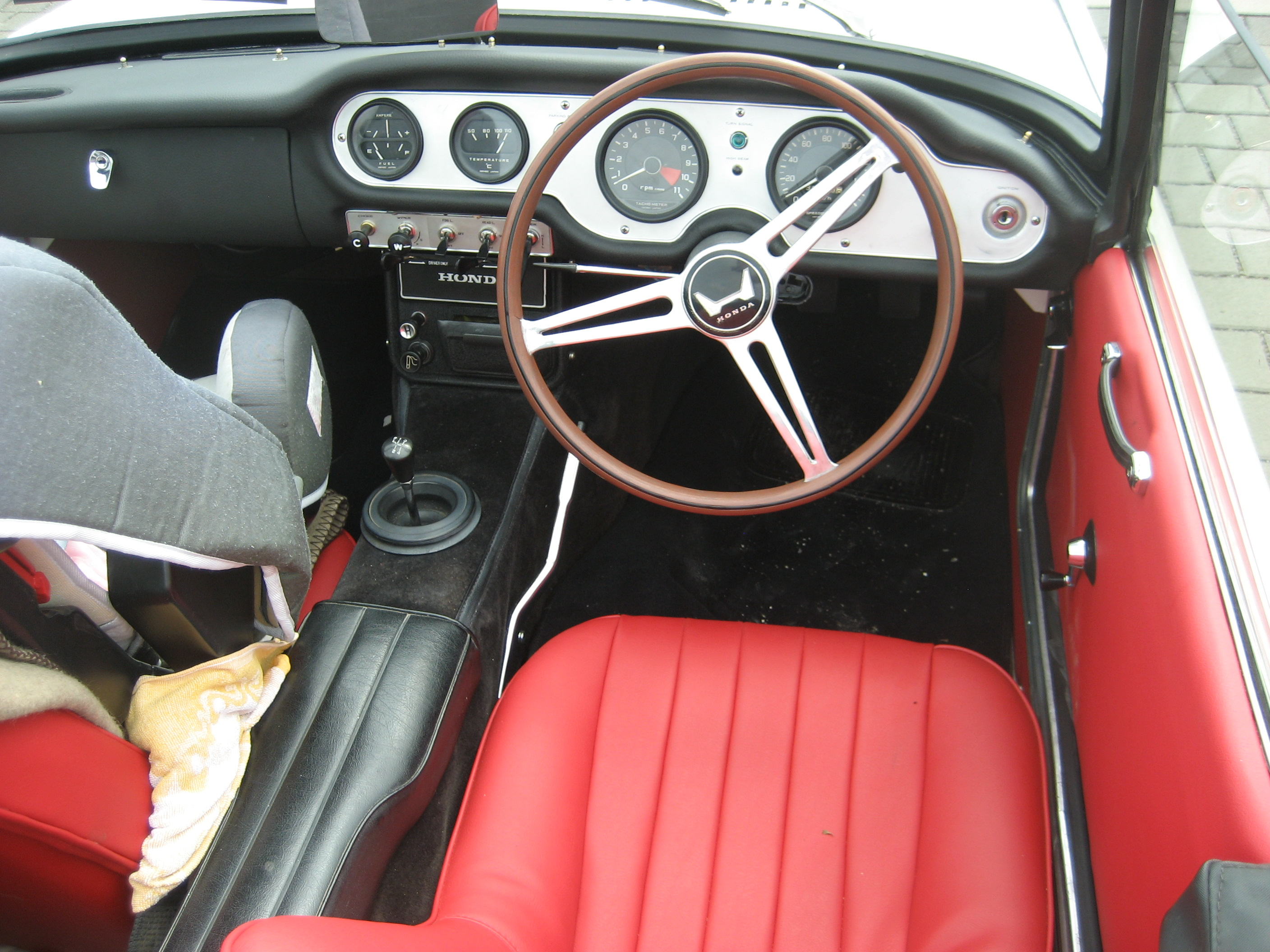 Honda S500 Armaturenbrett Rechtslenker